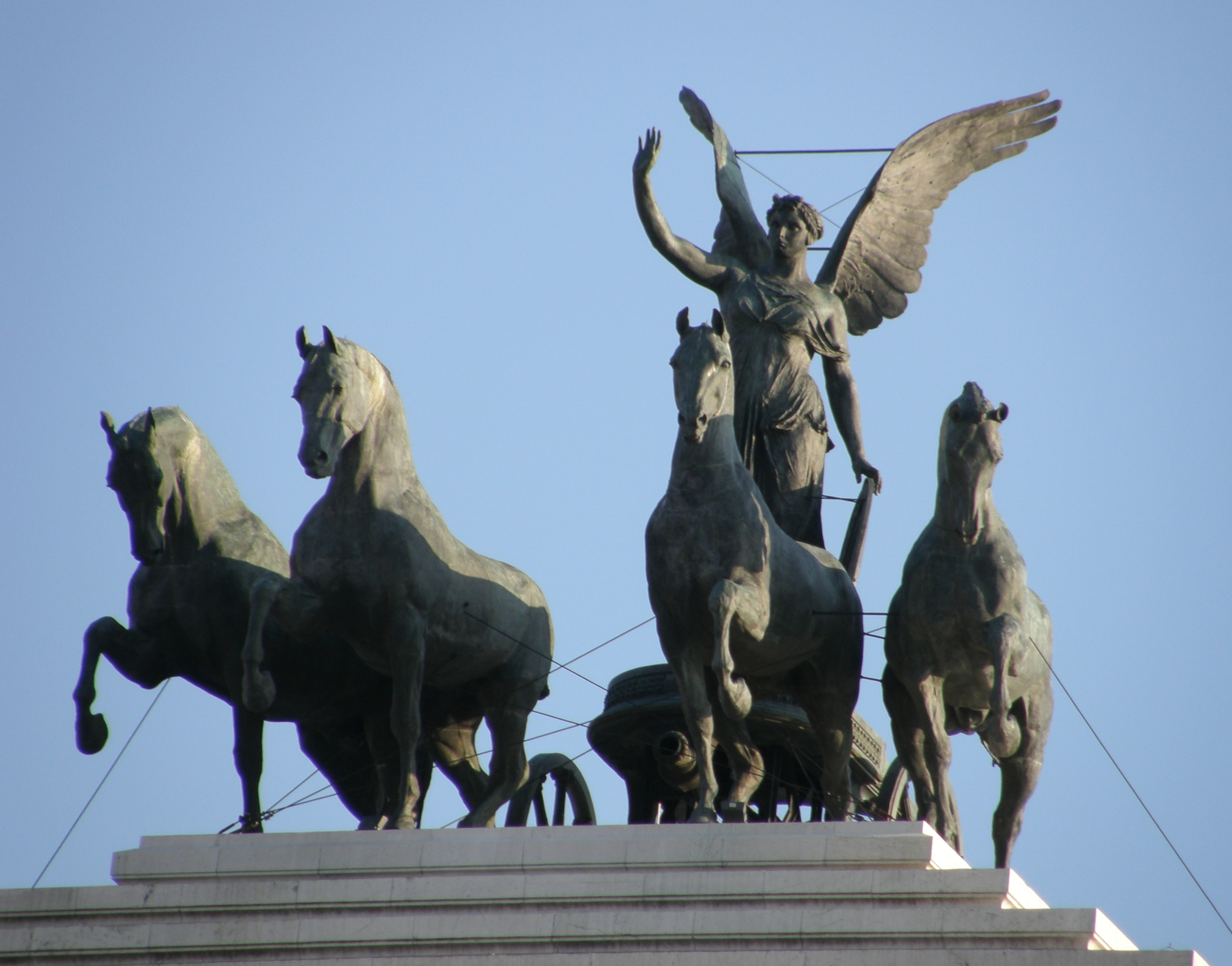 Rome - Italya, Vittoriano Quadriga dell'Unità. Photo taken from Piazza Venezia